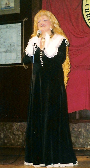 Violetta Villas, Wrocław